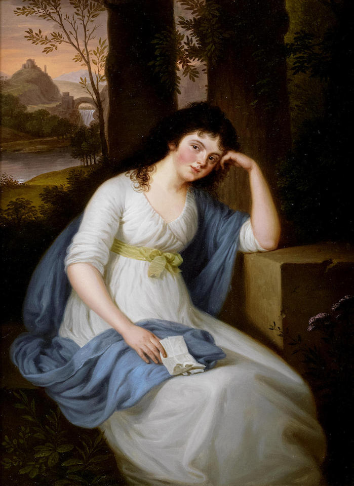 Герцогиня Анна Александровна де Серра Каприола, урожд. княжна Вяземская (1770–1840)